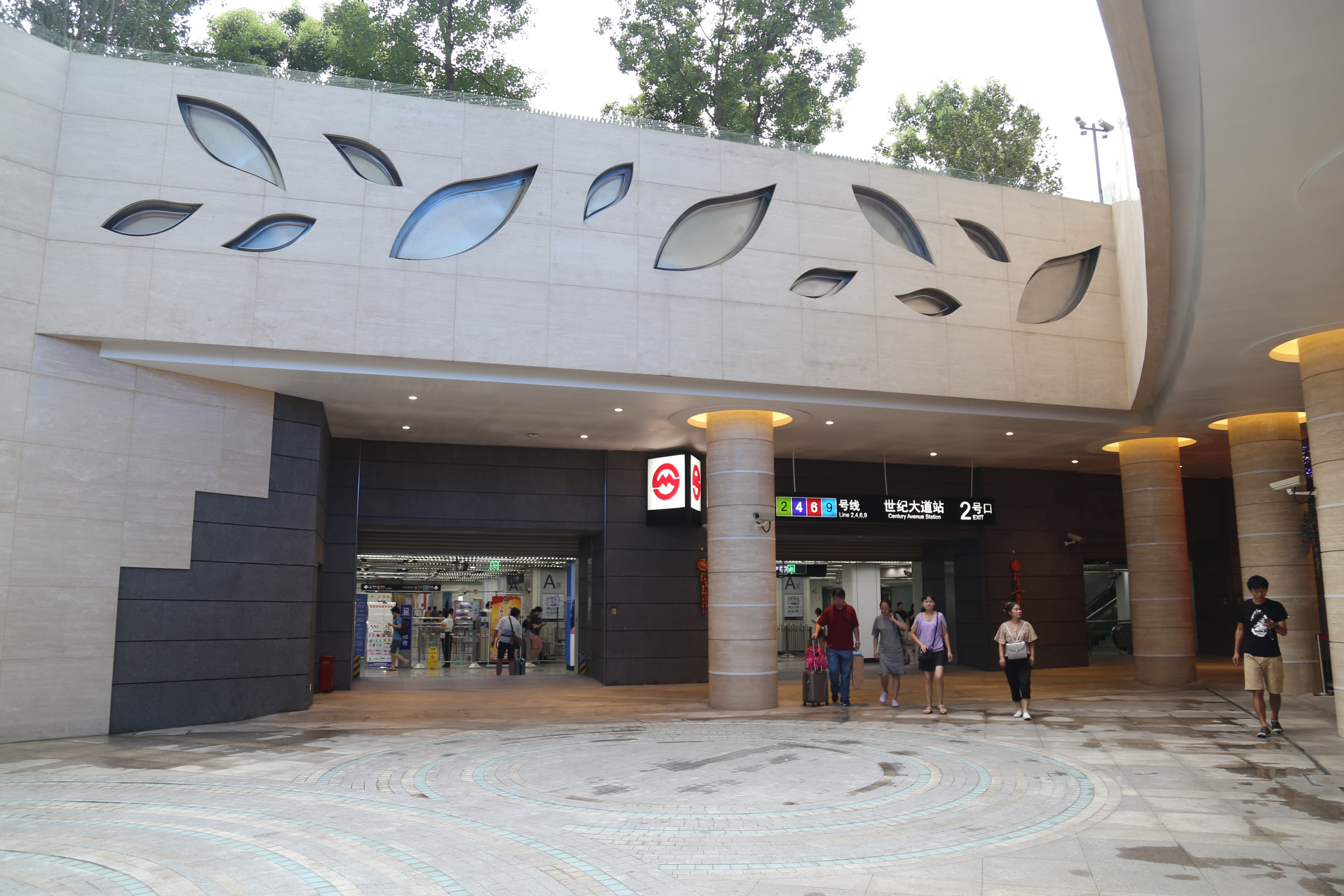 世纪大道站2号口